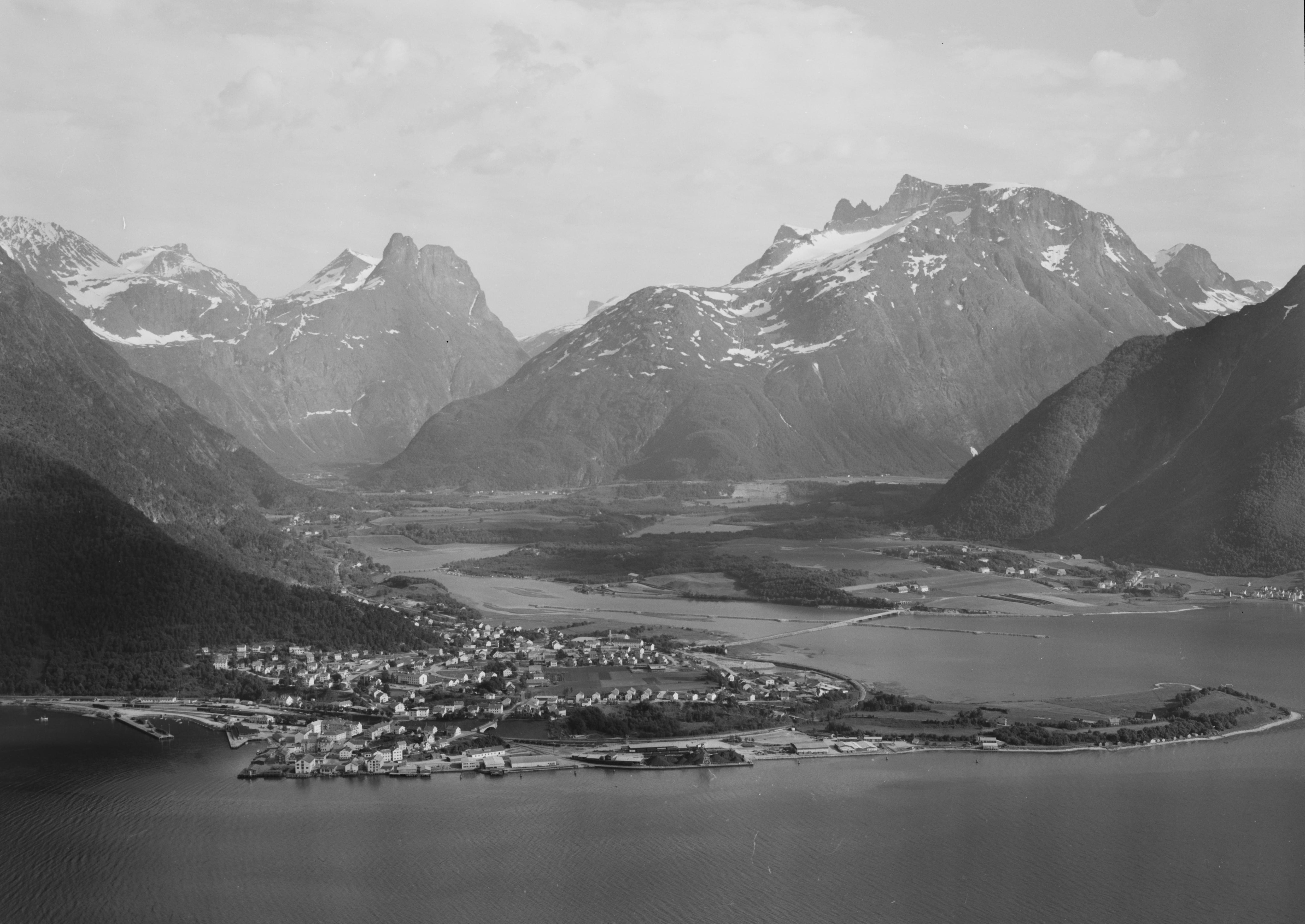 Bildet er hentet fra Nasjonalbibliotekets bildesamling. Anmerkninger til bildet var: fotograf: Å.M. Åndalsnes, Rauma, Møre og Romsdal